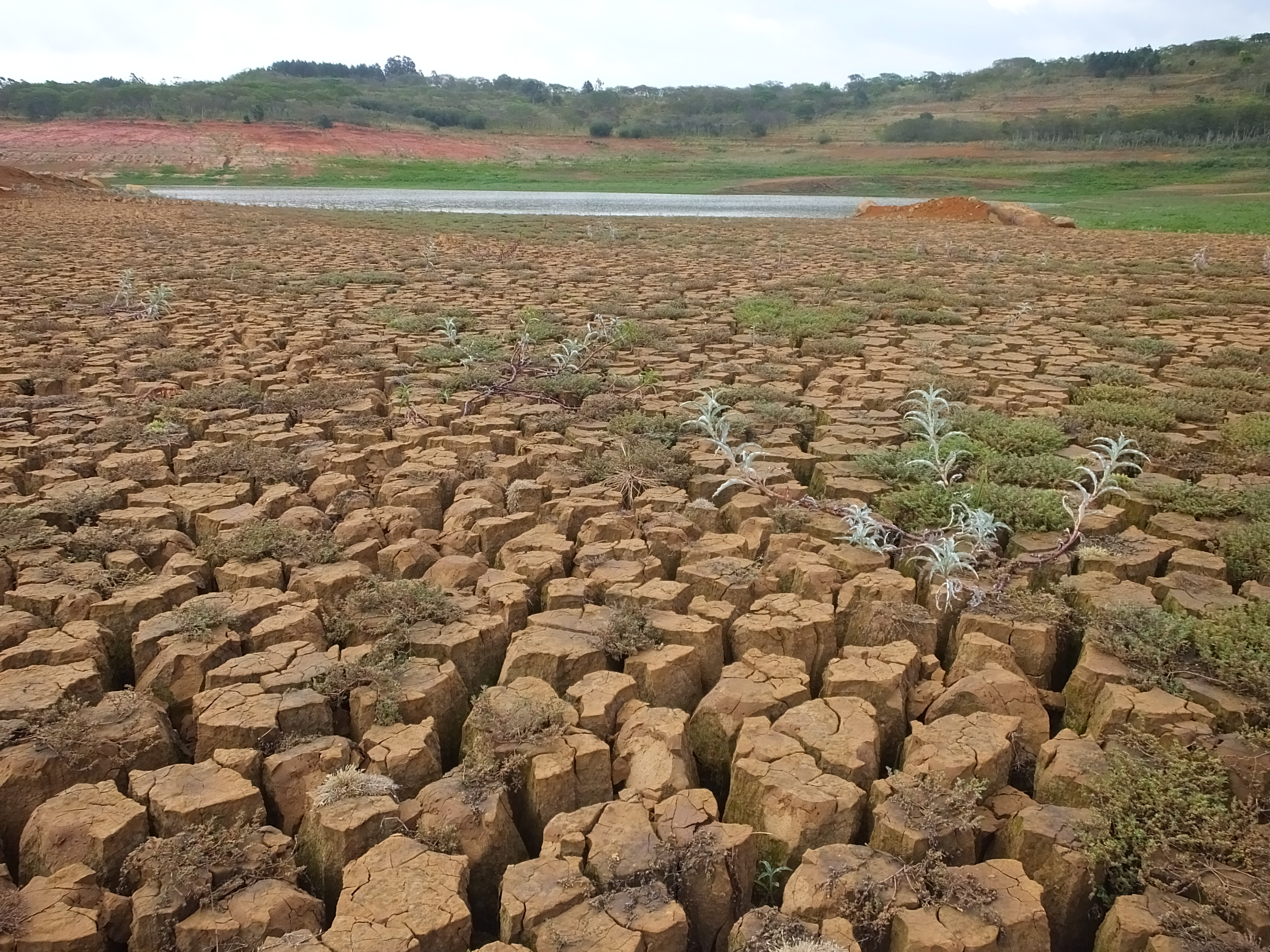 O sedimento seco na represa com nível baixissimo. 2014-09-21